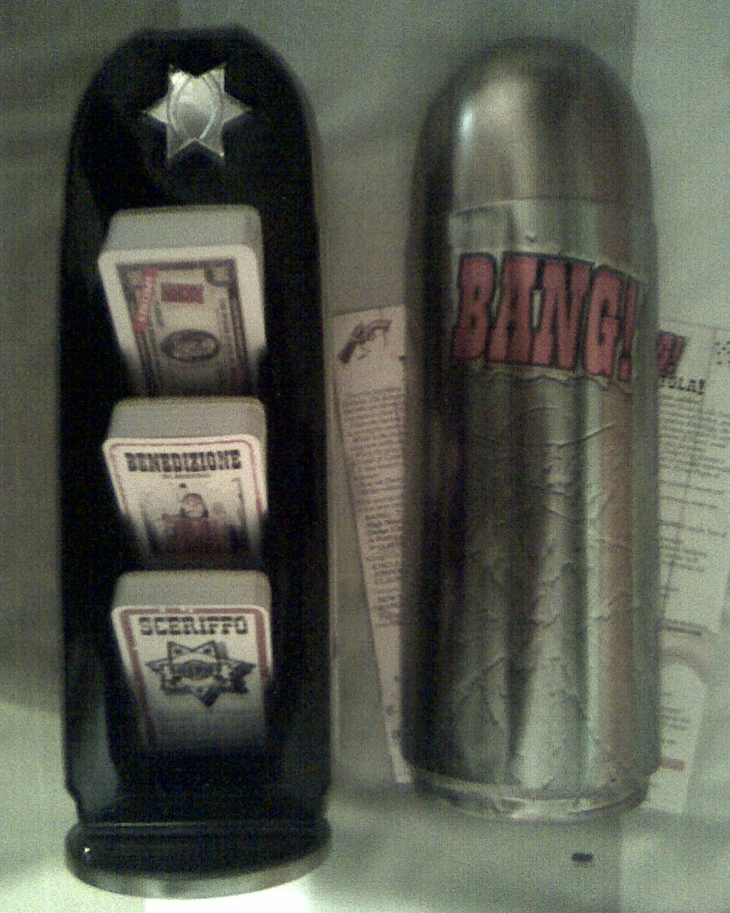 Fotografía de la edición especial de Bang! denominada Bang! The Bullet! tomada con mi Nokia 6555.